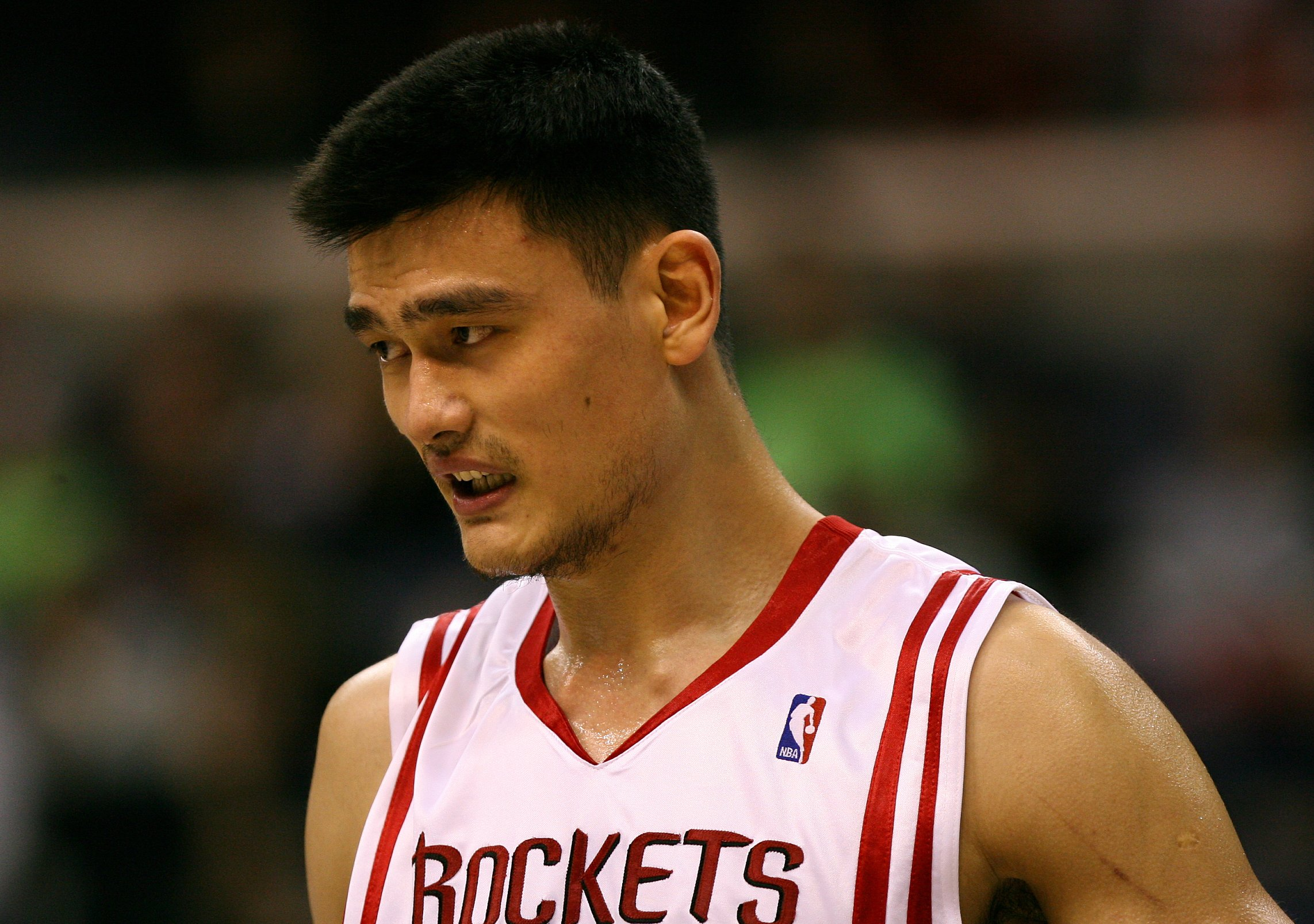 Yao Ming